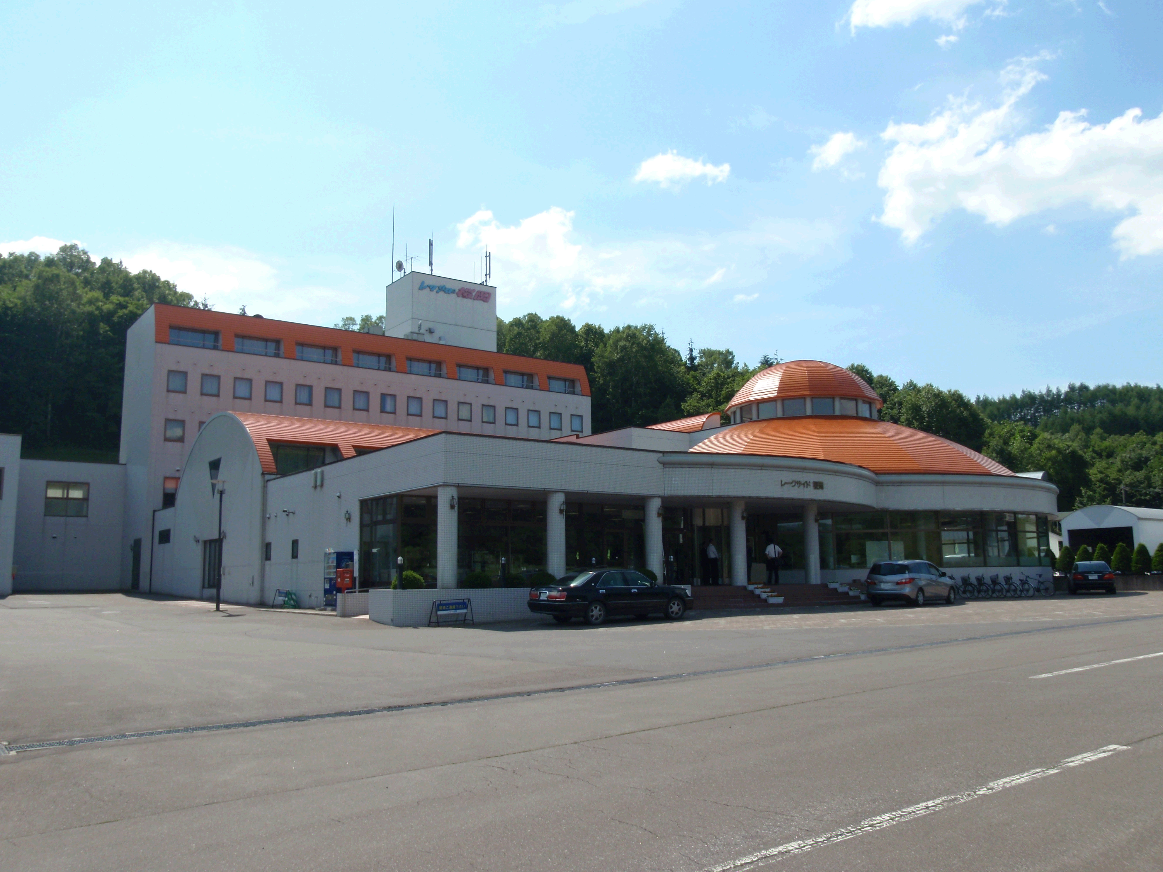 剣渕温泉、レークサイド桜岡